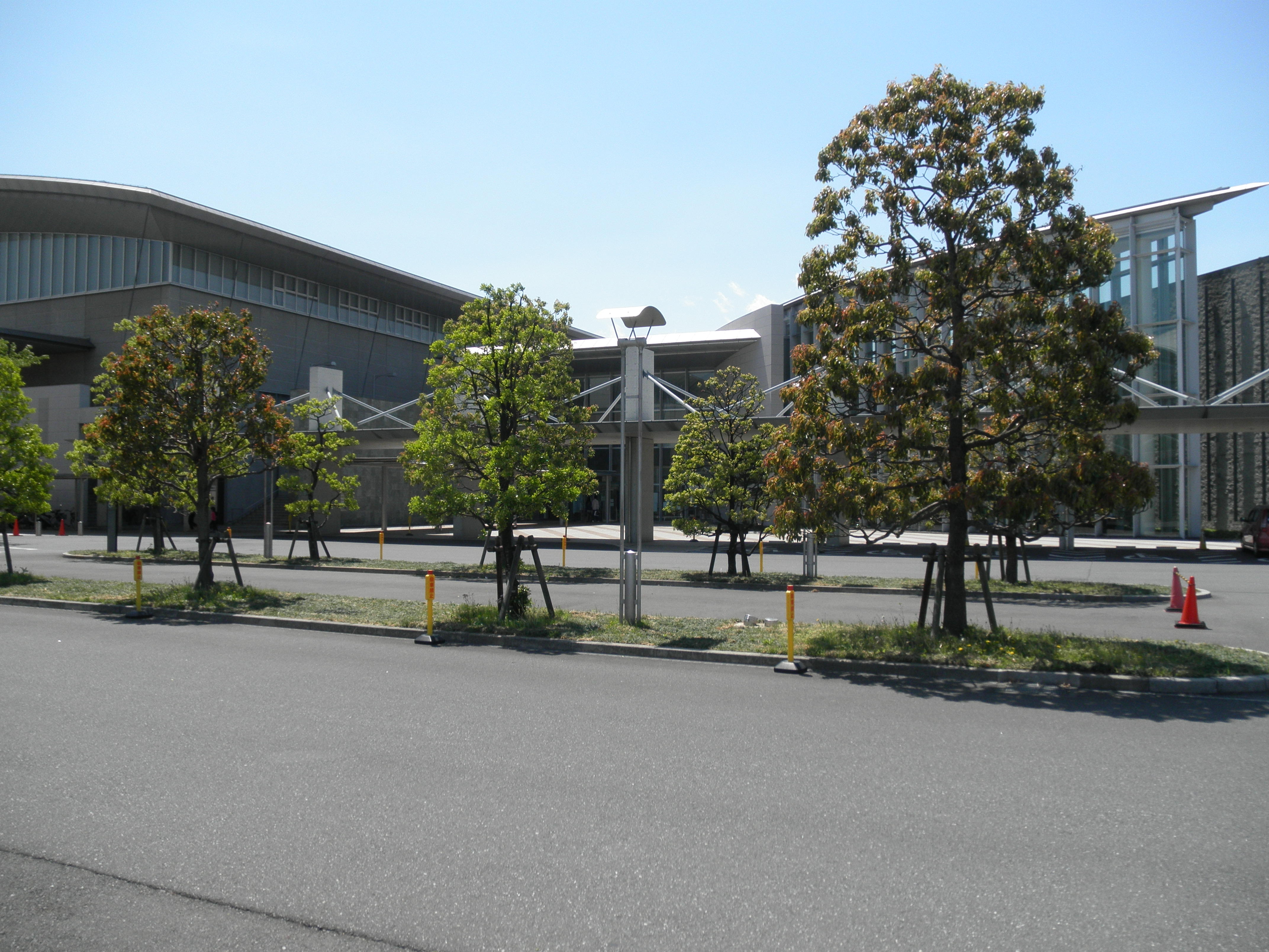 さいたま市記念総合体育館